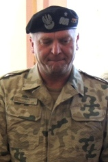 Generał brygady Andrzej Przekwas